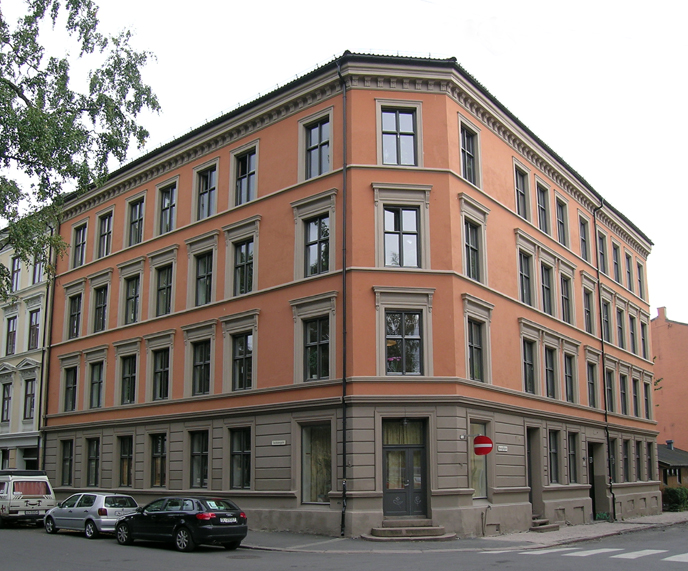 Bjerkelundgata 5, Oslo. Built 1888. Architect: Anselm Liljeström.